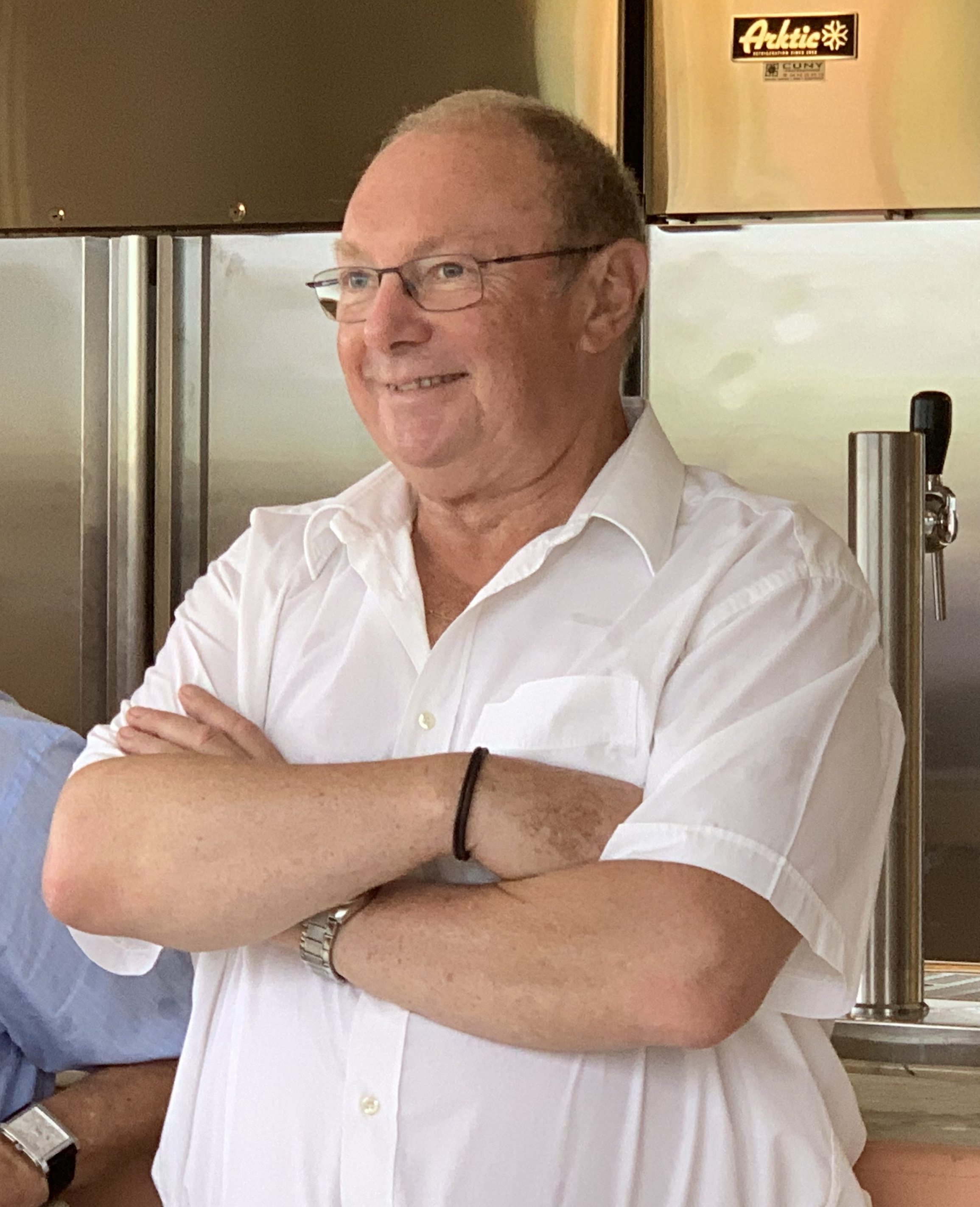 Inauguration nouveau bâtiment Stade du Forum (Ain Sud Foot) 6 juillet 2019.